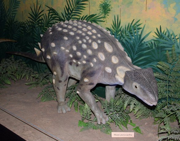 Kunbarrasaurus (formerly Minmi) model, National Dinosaur Museum, Canberra